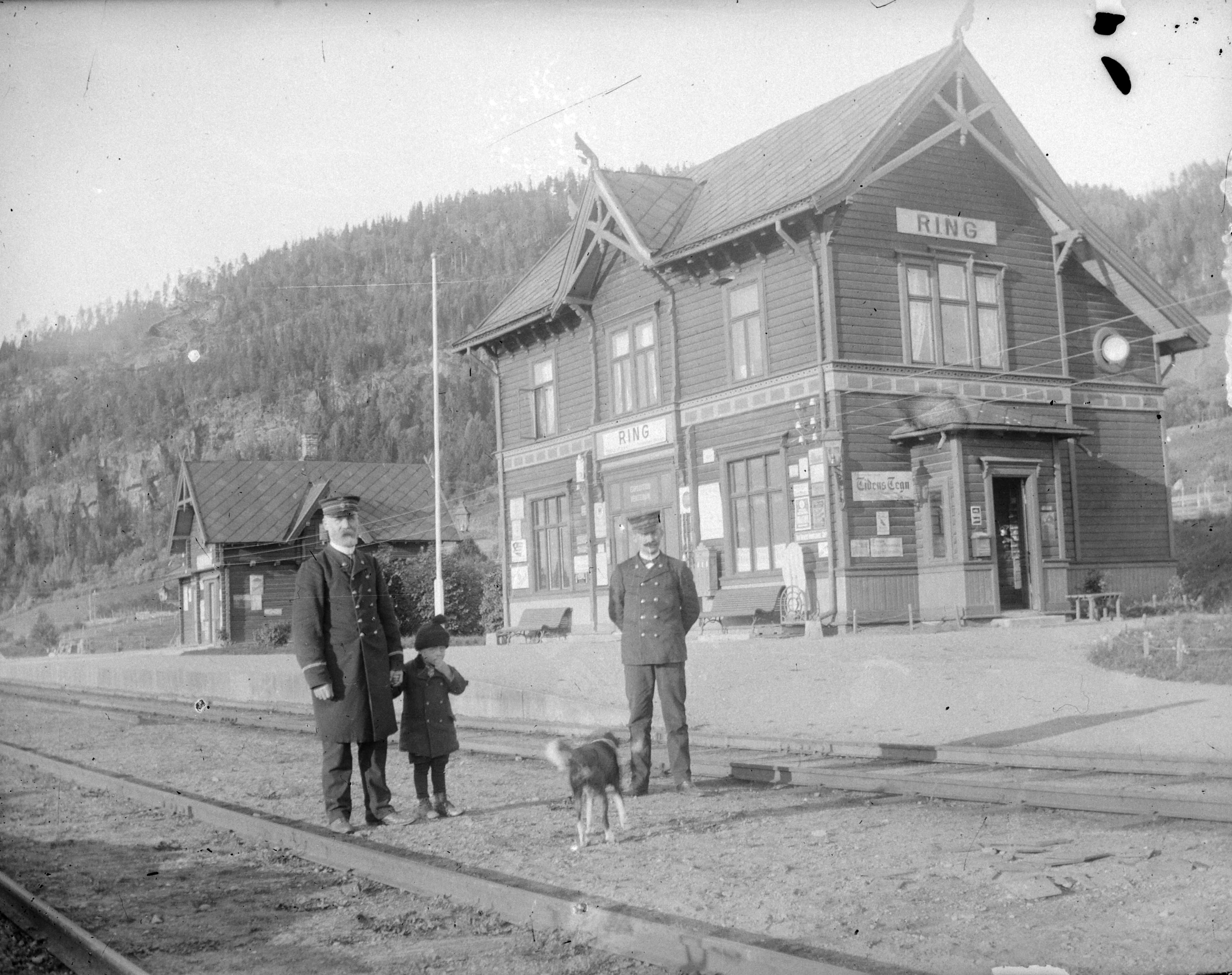 Ring stasjon i Ringsaker, tatt mellom 1900 og 1906 av fotografen Ole Hjelt. To ansatte i uniform, et barn og en hund.